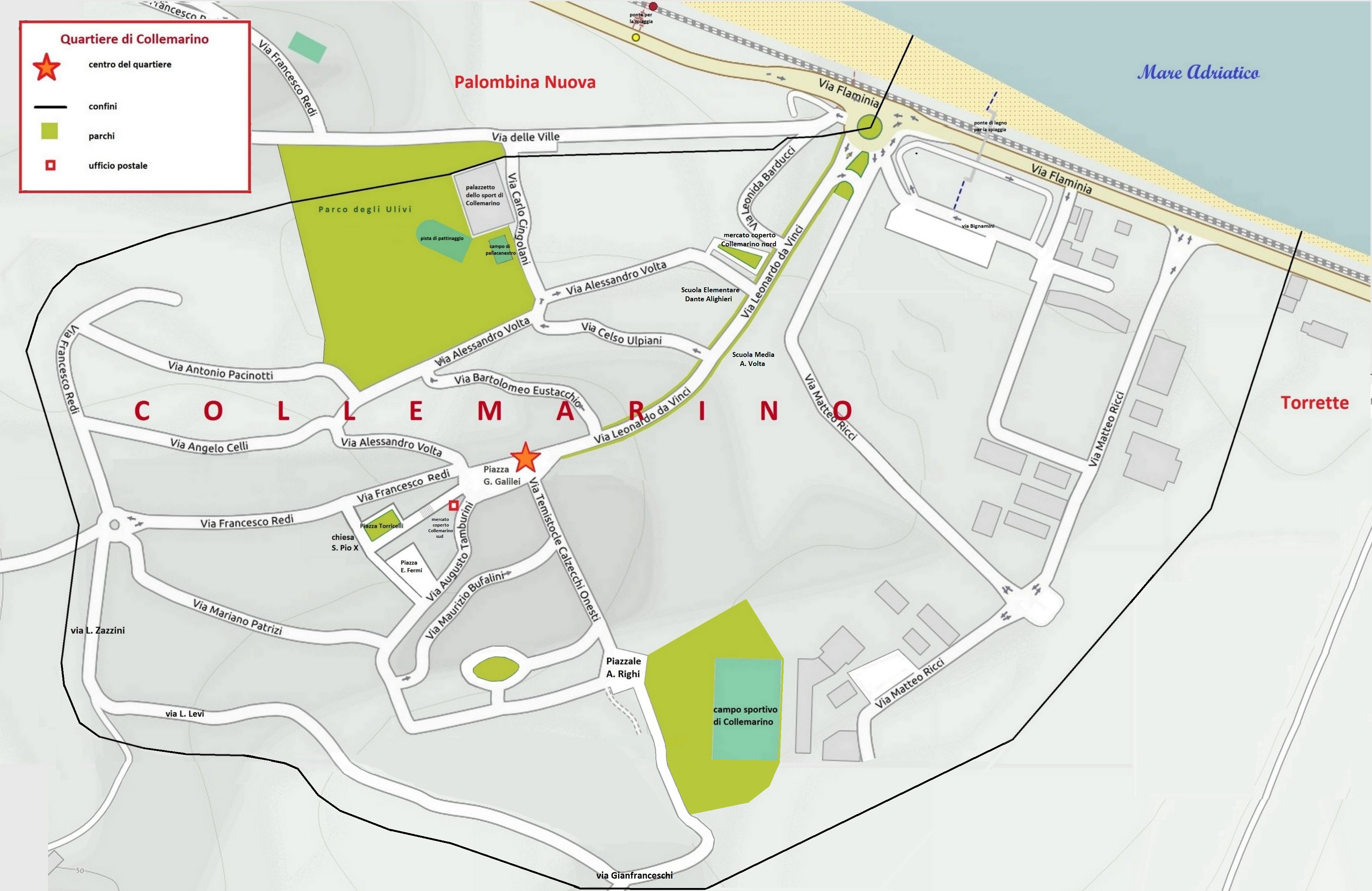 Mappa del quartiere Collemarino di Ancona, con i confini, le vie, le piazze e i parchi.